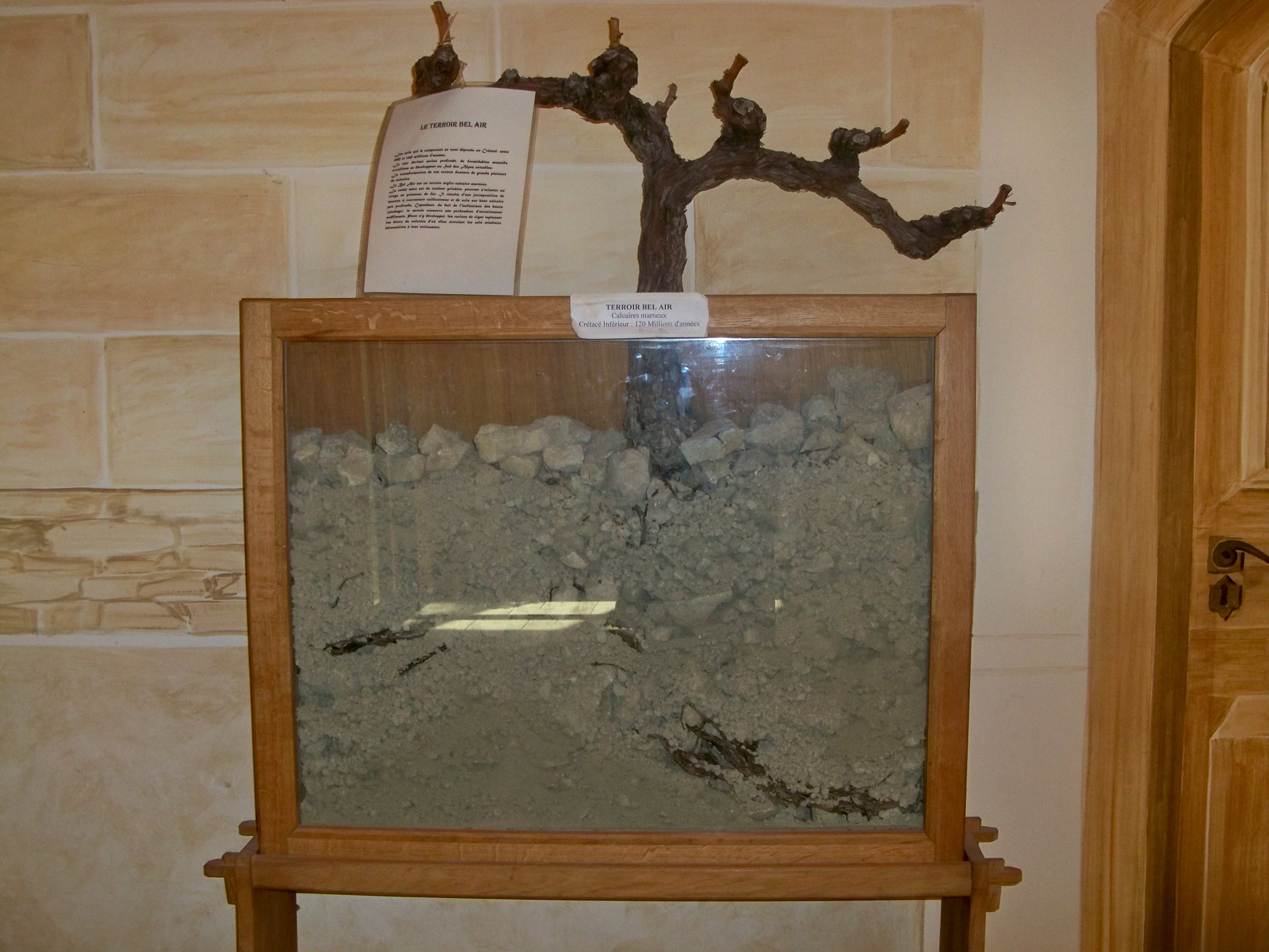 Vigne de Beaumes de Venise, Terroir Bal Air Calcaire